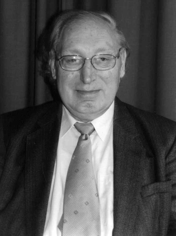 Pieter Willem Pestman (1933-2010). Foto afkomstig uit Levensberichten en herdenkingen 2011 van de Koninklijke Nederlandse Akademie van Wetenschappen (Amsterdam, 2011).